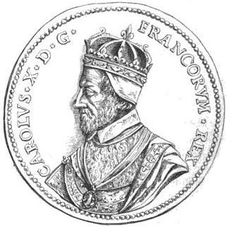 "Médaille du roi Charles X" (XVIe siècle)